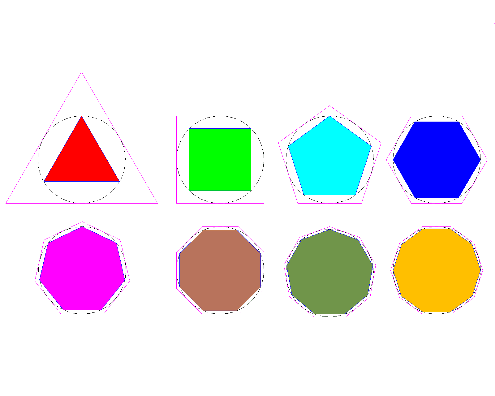 ഒരേ ആരമുള്ള വൃത്തത്തിനകത്തും പുറത്തും ബഹുഭുജം വരക്കാം. Inscribed in circle and circumscribed about circle.